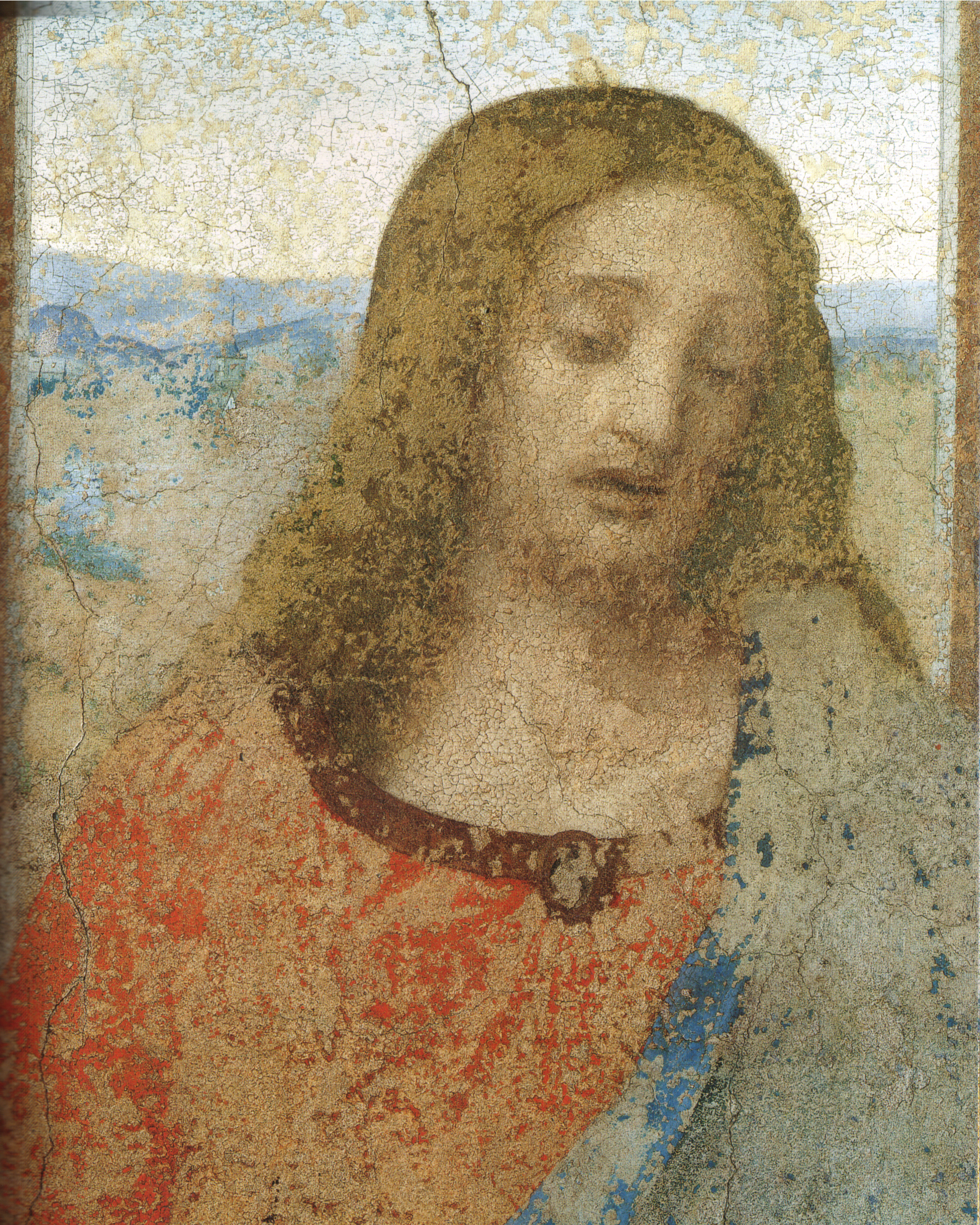 LEONARDO da Vinci The Last Supper Mixed technique, 460 x 880 cm Convent of Santa Maria delle Grazie, Milan